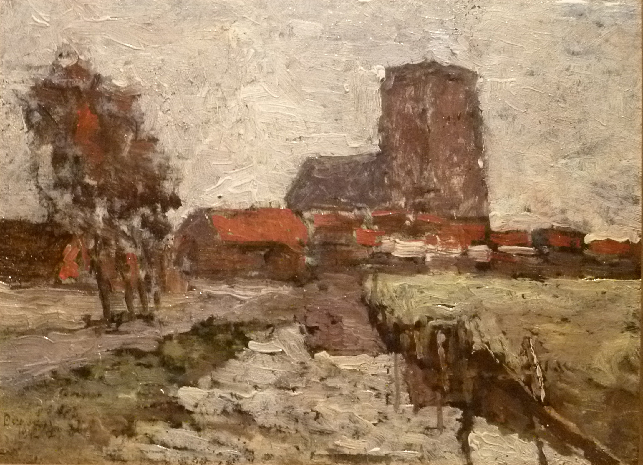 "Oostkerke, 1942", olie op paneel (24 x 30 cm) door de Belgische kunstschilder Pierre Henri Bayaux (1884-1946); privéverzameling